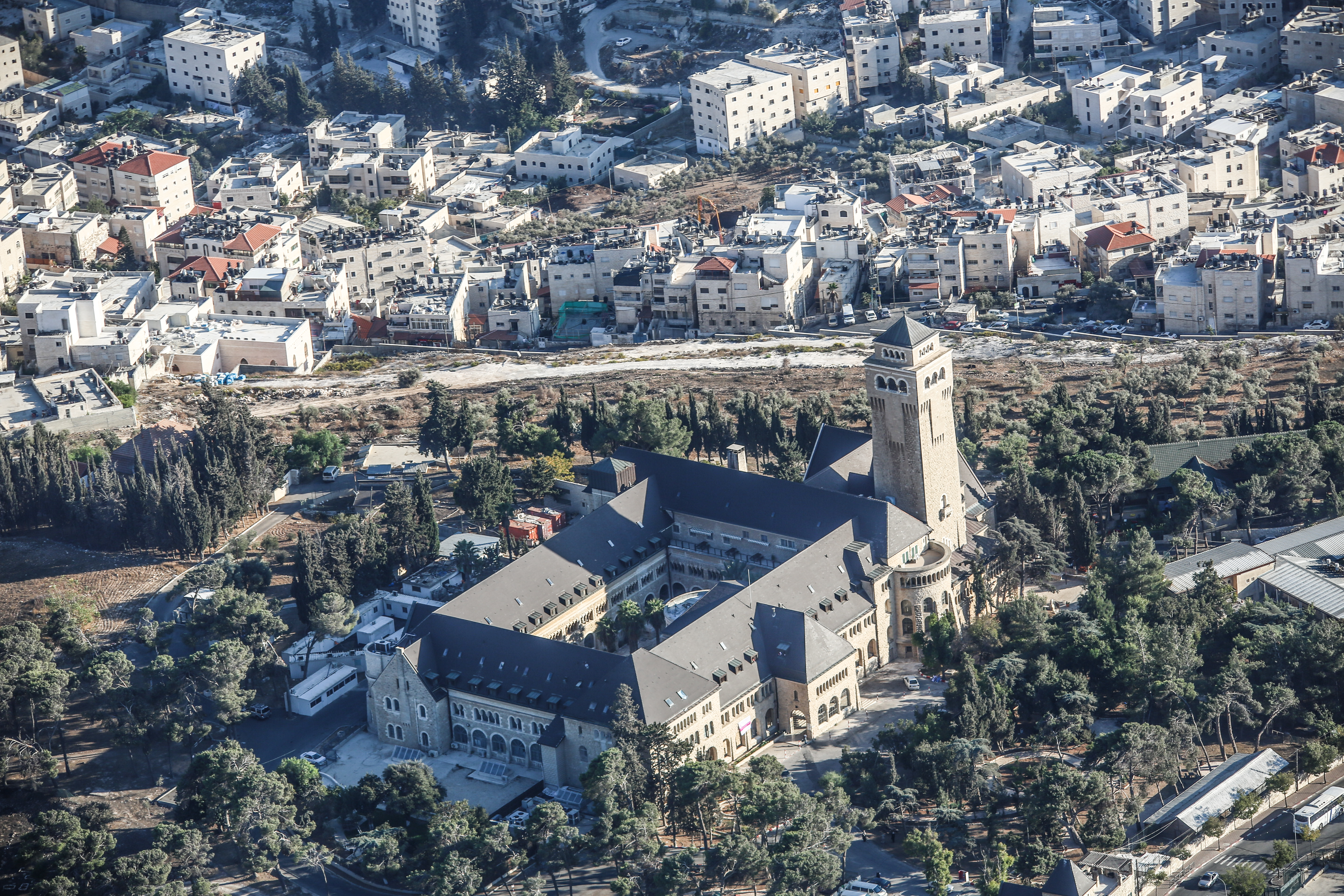 מתחם אַוּגוּסְטֶה ויקטוֹריה משתרע על שטח של כ-80 דונם בפסגת הר הזיתים בירושלים. נקרא על שם אוגוסטה ויקטוריה משלזוויג הולשטיין, אשתו של מקים המתחם, וילהלם השני, קיסר גרמניה. במתחם כנסייה עם מגדל פעמונים, וכן אכסניית צליינים. כיום משמש כבית חולים, ובמזרחו ממוקם "המכון הגרמני הפרוטסטנטי לארכאולוגיה בארץ הקודש".